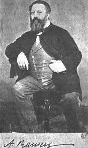 Ritratto Antonio Ranieri